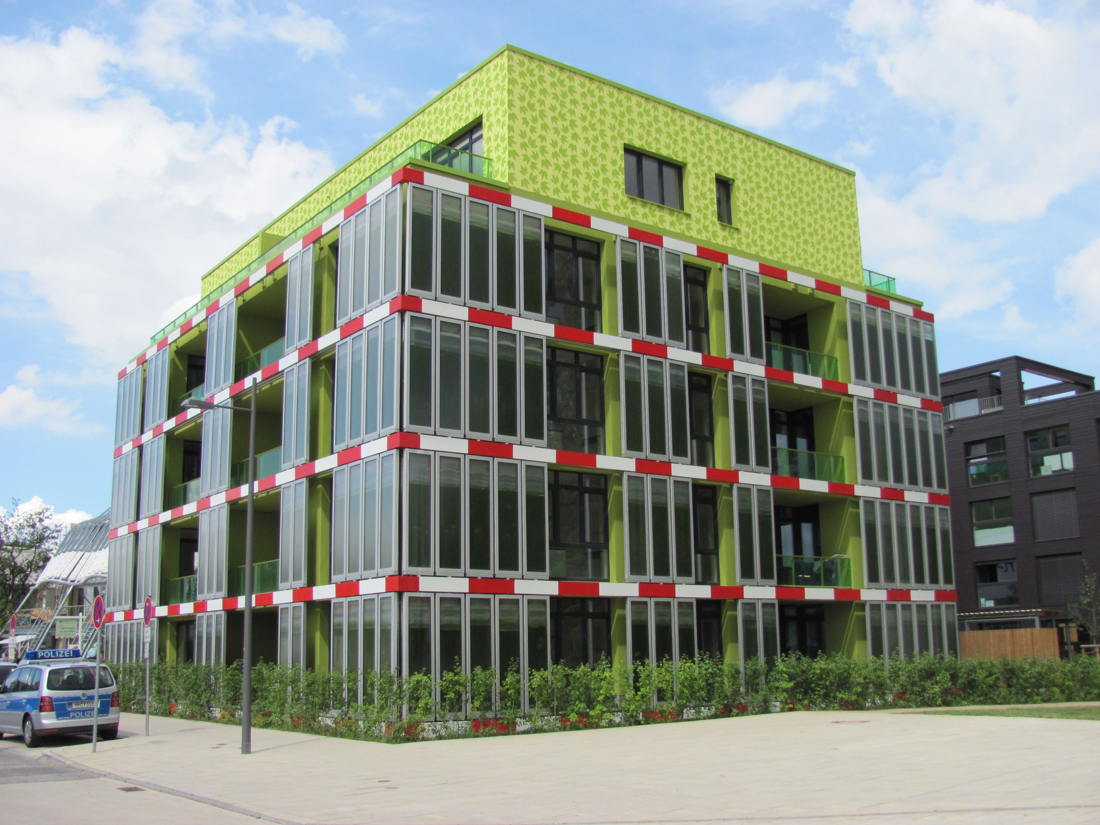 BIQ mit Bioreaktorfassade (Am Inselpark 17) auf der IBA Hamburg in Hamburg-Wilhelmsburg